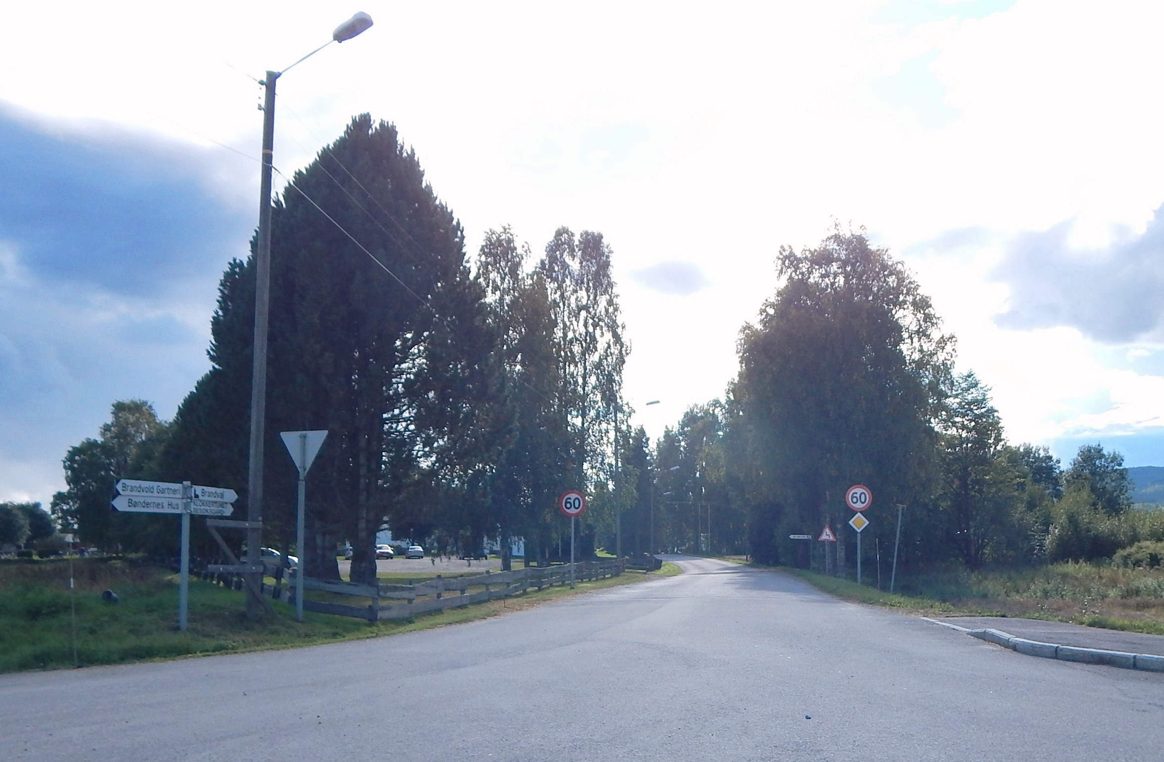 Brandvalvegen (FV390) tar av fra Bruvegen (FV370) i nord.